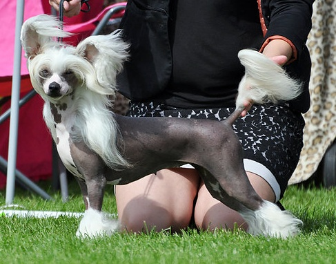 DKCH VDHCH SECH NordJW-10 Sun-Hee's I'm a Marionette, tre år, chinese crested